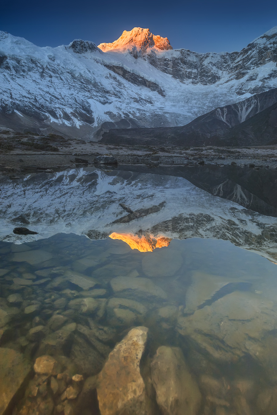 Вид на Нгади Чули (7 871 м) в рассветное время с долины Пунг Гьен (4 040 м)